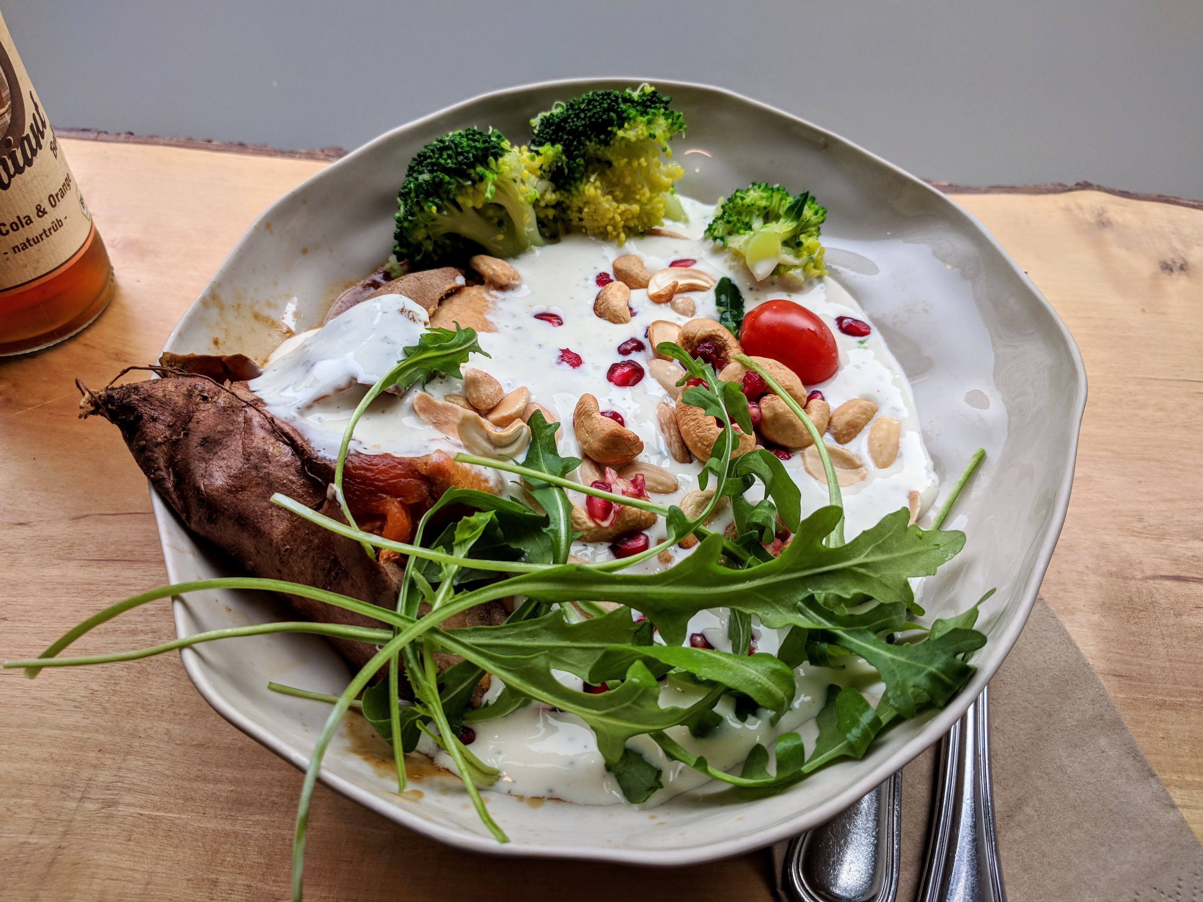 Schüssel mit Süßkartoffel, Dal, Brokkoli, Kirschtomaten, Soja-Minz Joghurt, Granatapfel